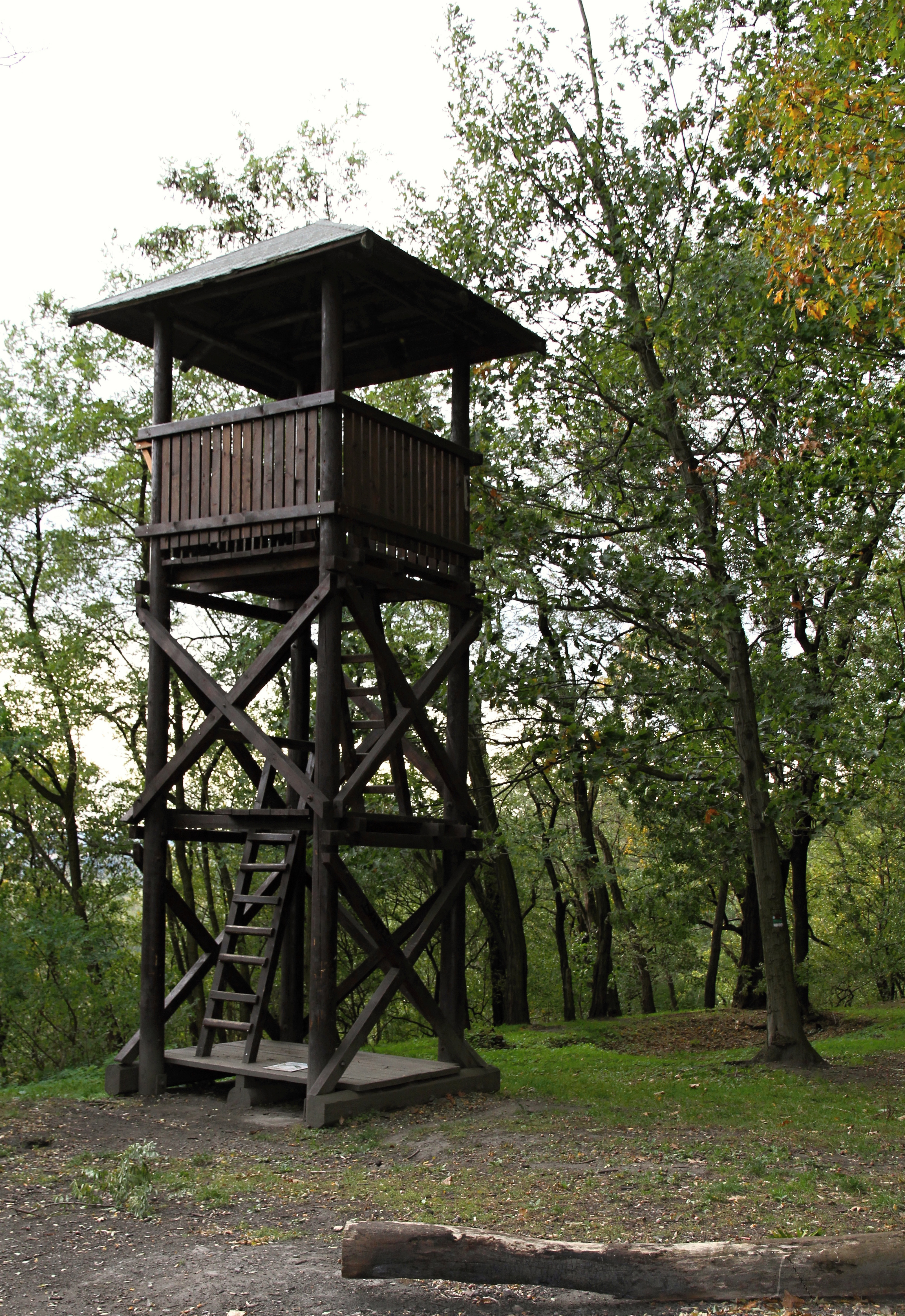 Rozhledna na Landeku